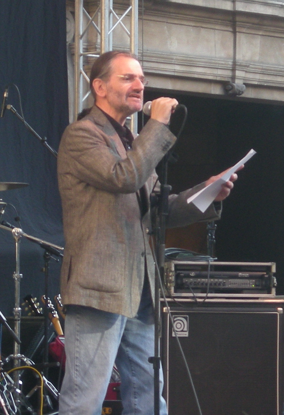 Jaume Mateu i Martí, a la Plaça de Cort, Diada per la Llengua, 17 de maig 2008.